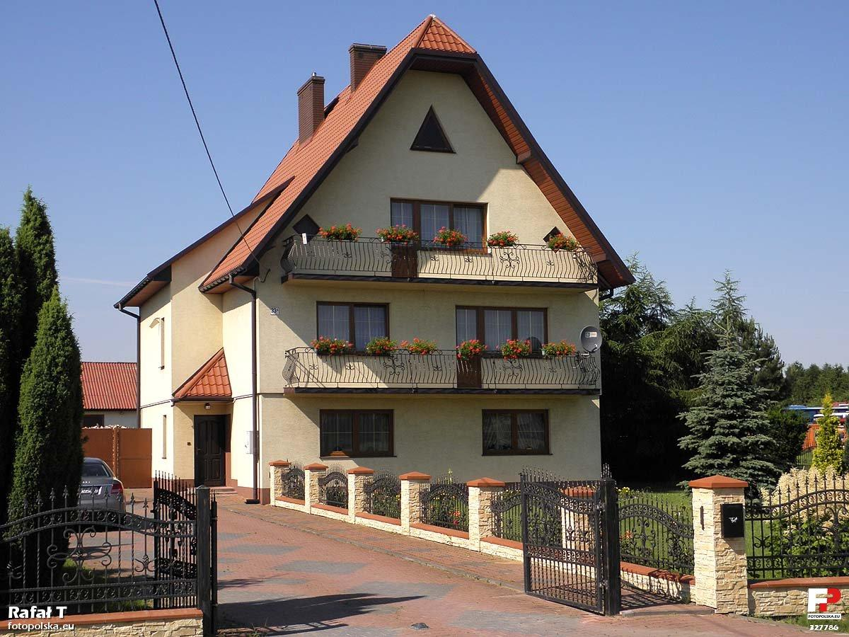 Kałków 33a